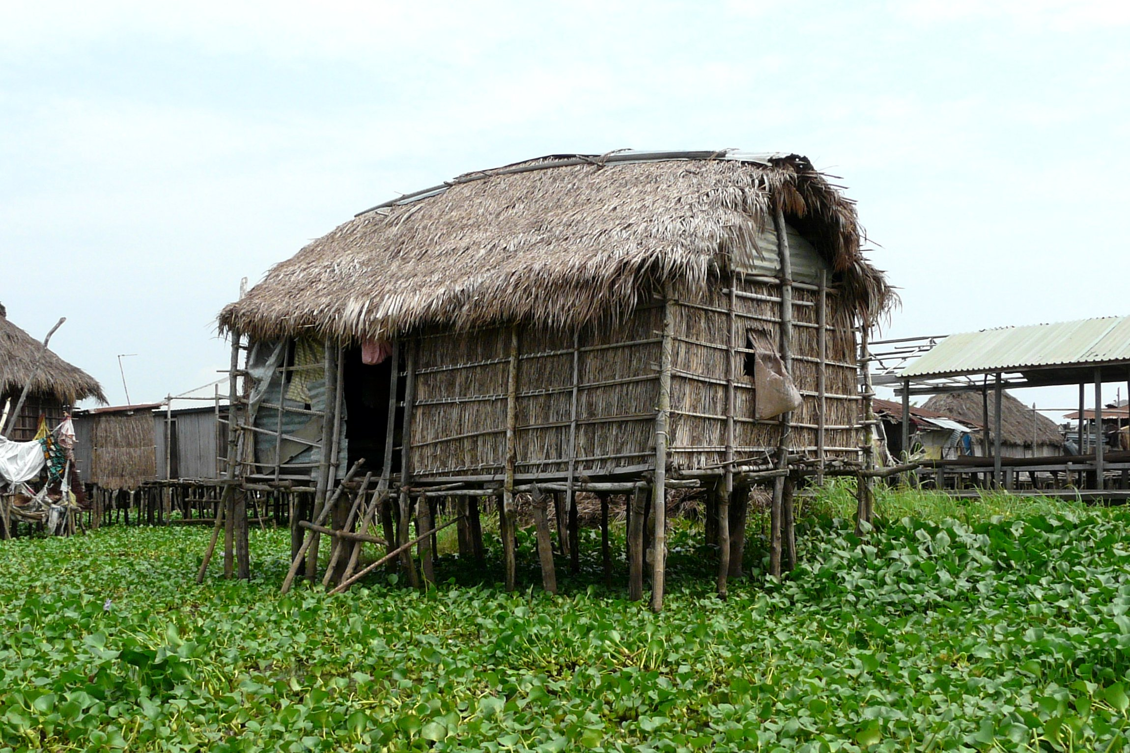 Ganvié (la Venise africaine) Bénin en novembre 2008 par BRUNNER Emmanuel (manu25)